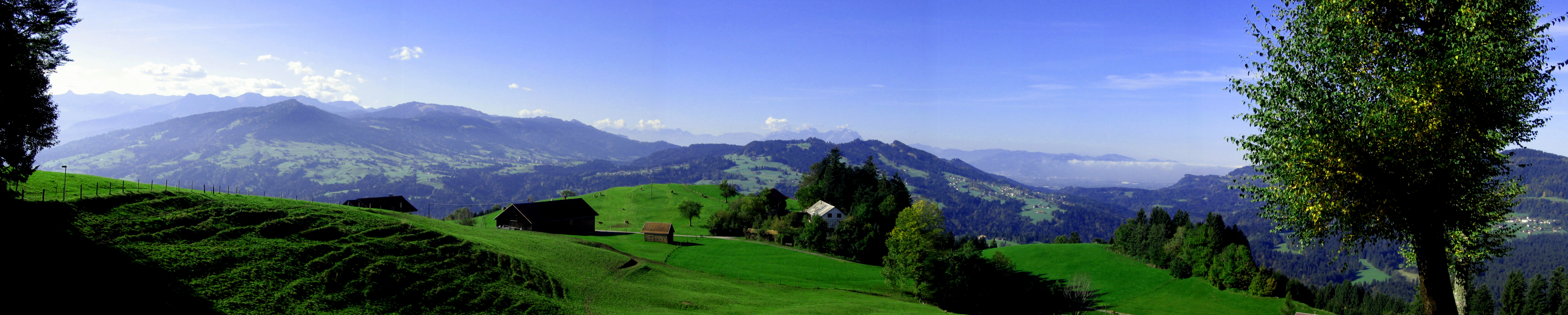 Doren (Hüttersberg) looking towards the Rhine-valley in Vorarlberg